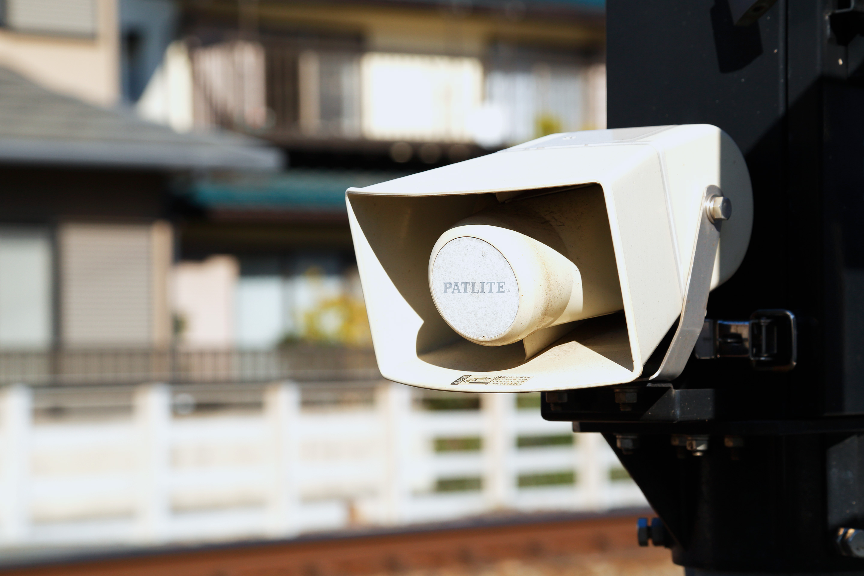 パトライト製のja:鉄道施設向けスピーカー。